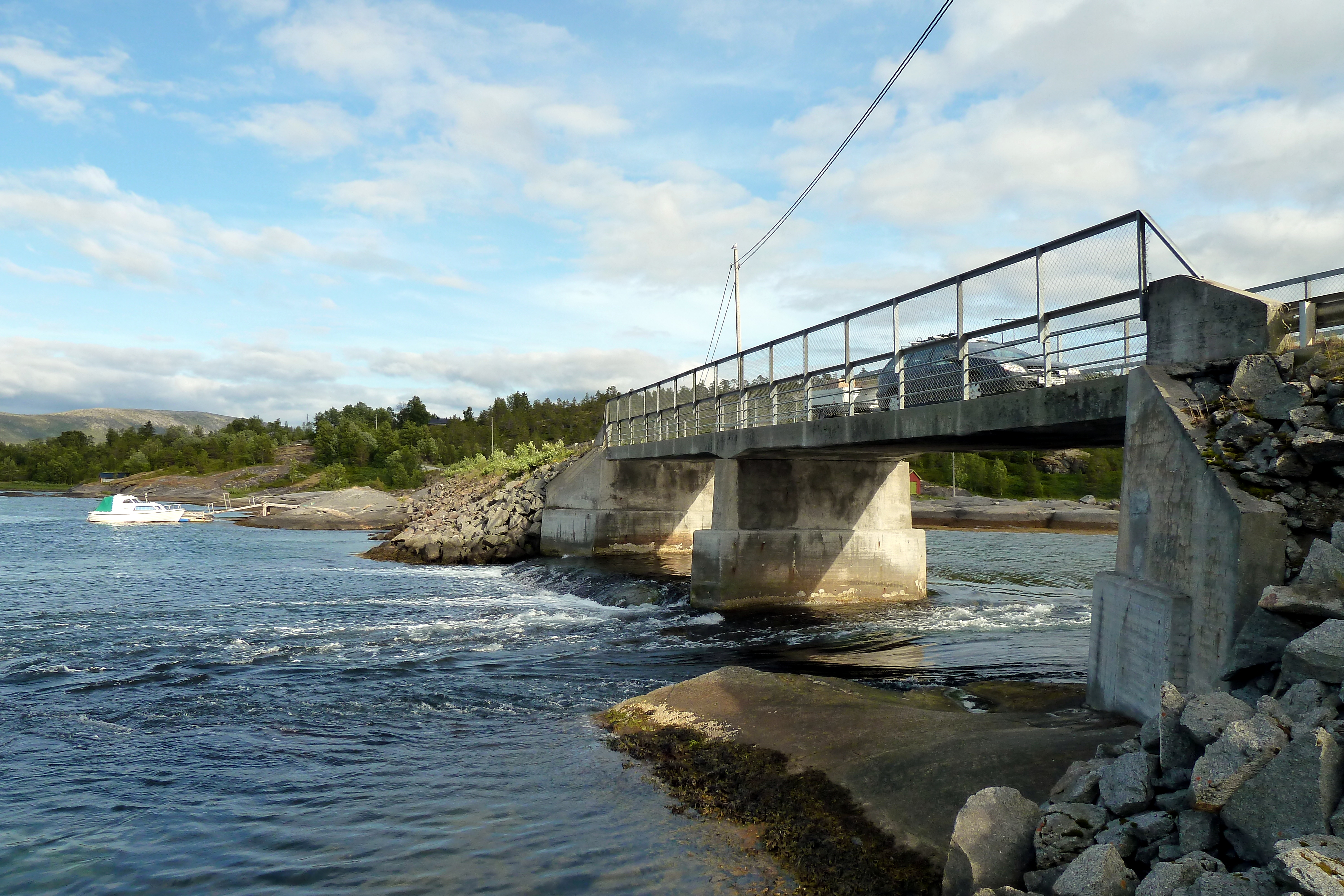 Røttangsstraumen og Røttangsstraumen bru (lengde: 30 meter) mellom Finnøya og Straumsnesøya i Hamarøy, Nordland.